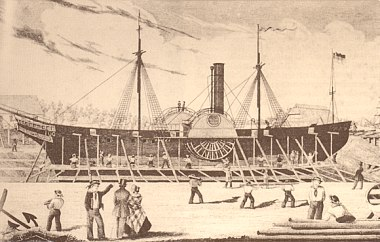 Das Bild zeigt die Dampffregatt Erzherzog Johann im Trockendock zwischen 1849 und 1851.